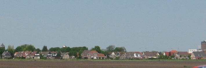 Scharsterbrug, gezien vanaf A6